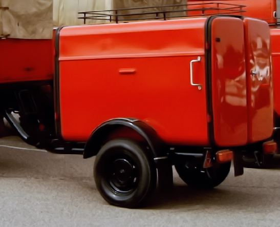 Schlauchtransportanhänger am Löschfahrzeug Robur LO 2002A.